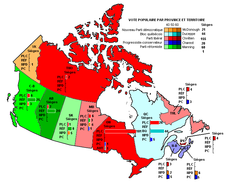 Carte du Canada démontrant le vote populaire lors de l'élection de 1997 avec barres graphiques démontrant le total des sièges de chaque province et territoire